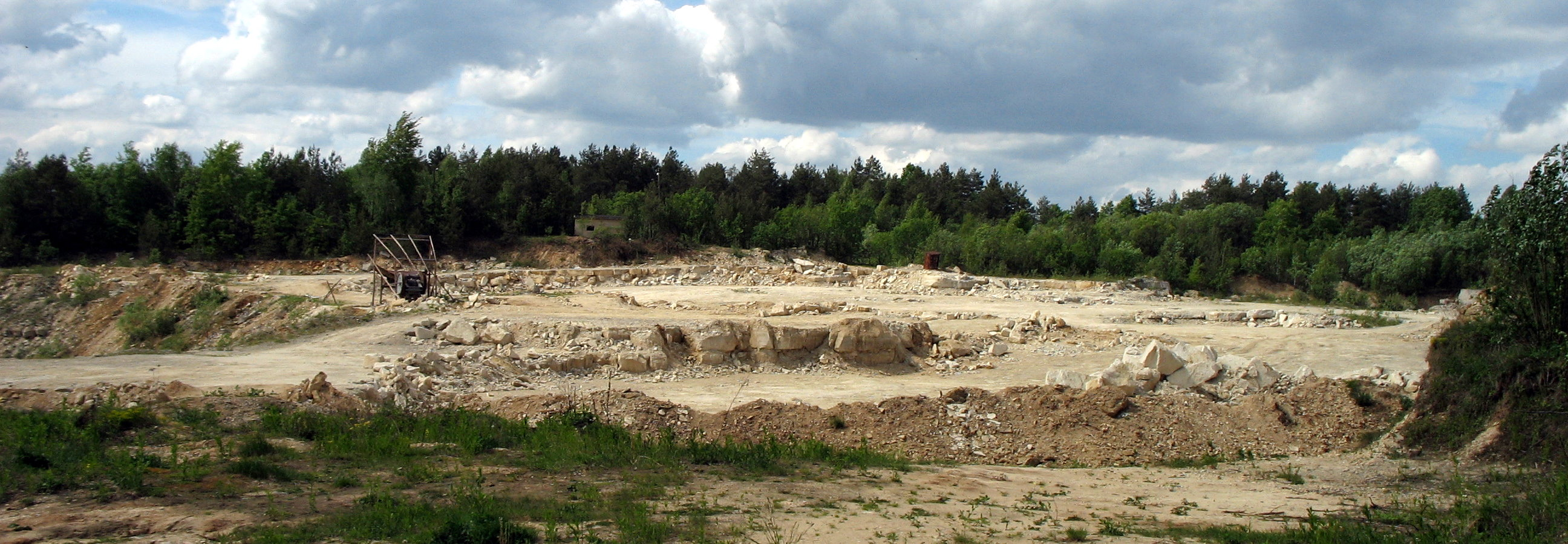 Kamieniołom w Bruśnie (Polska)